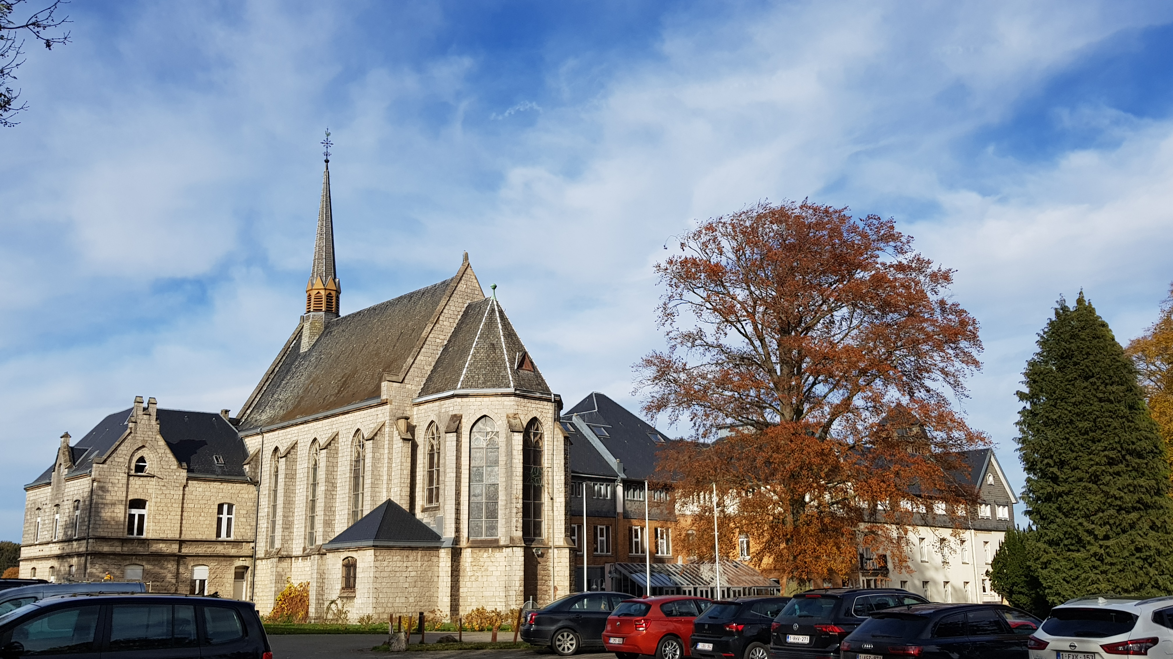 Katharinenstift, Astenet, Lontzen, Belgien